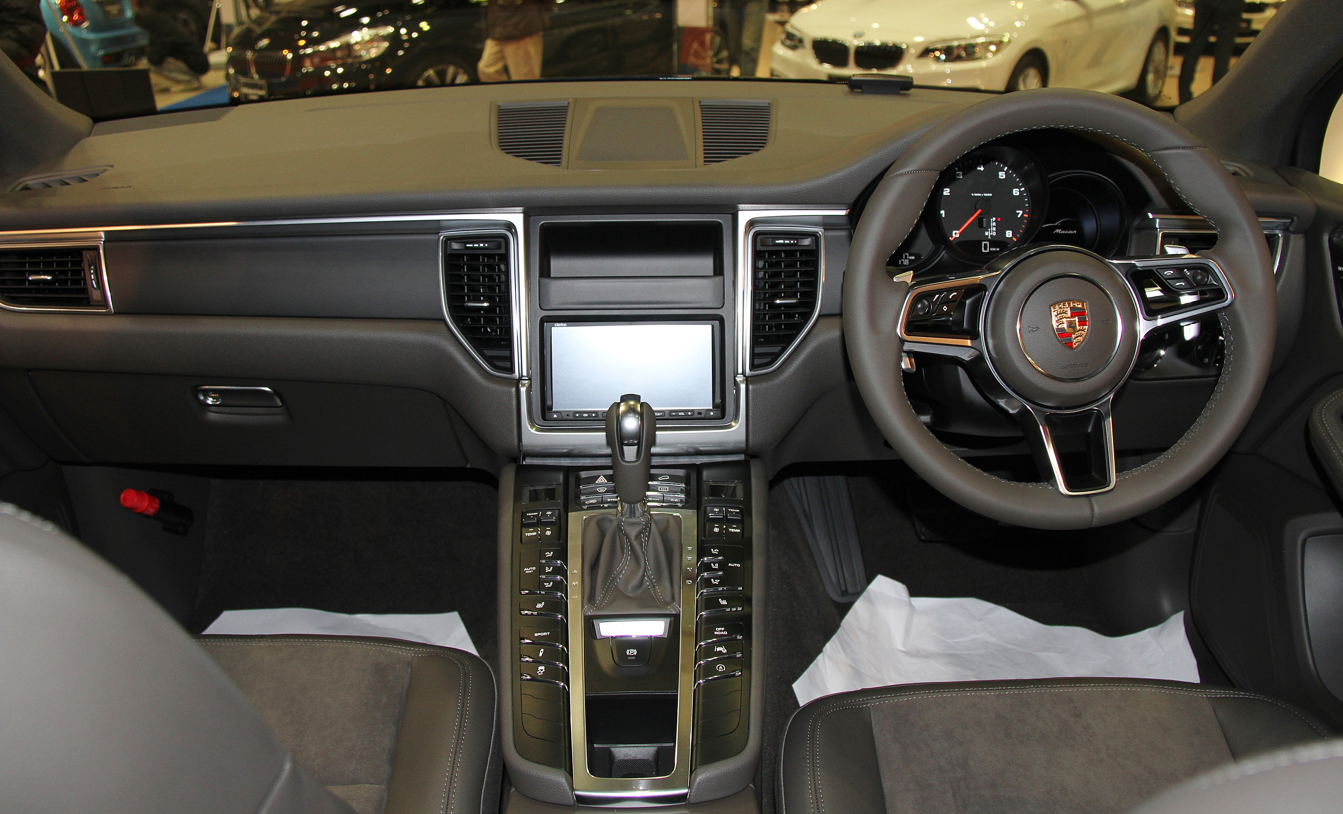 Porsche Macan